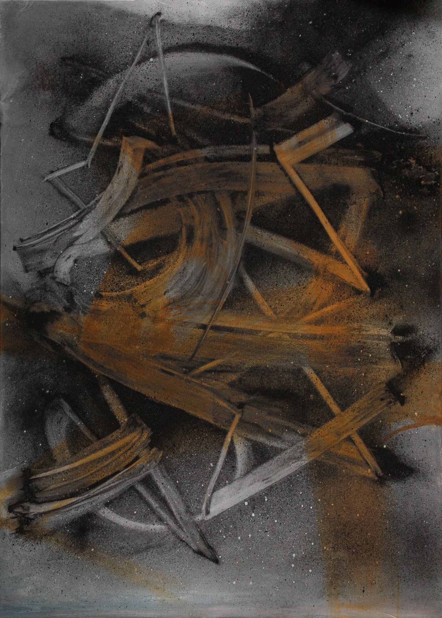 painture de Piotr Szmitke